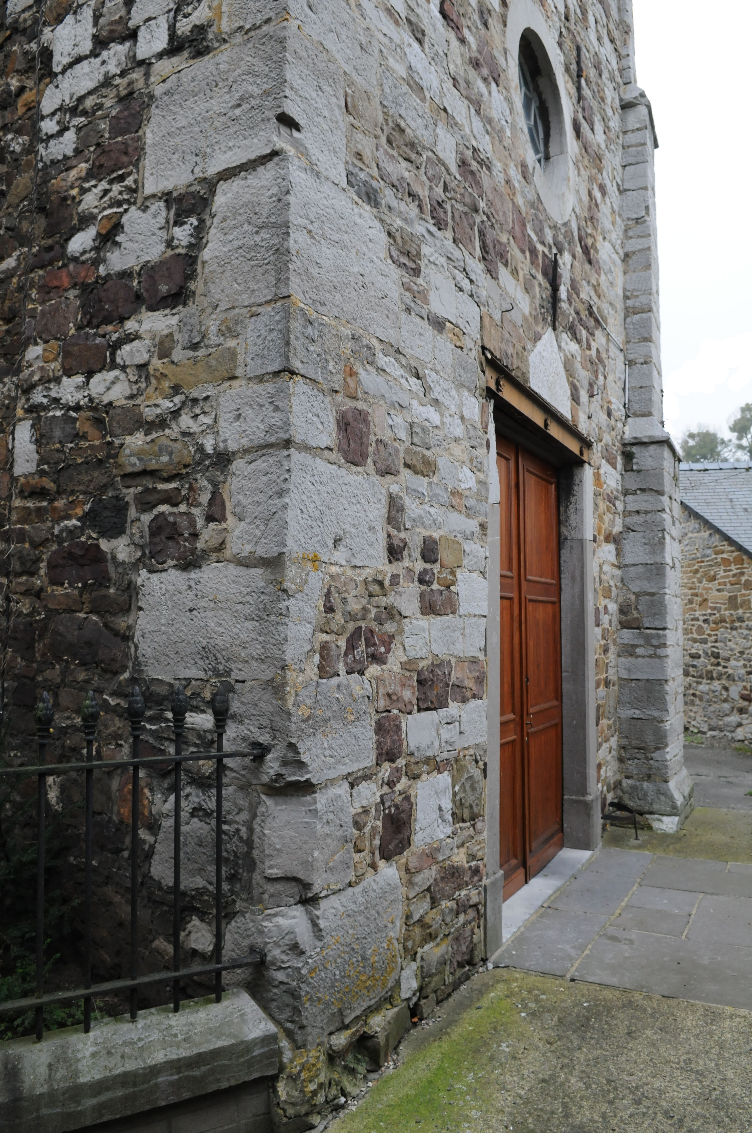 Eglise de Dave, Tour, détail.